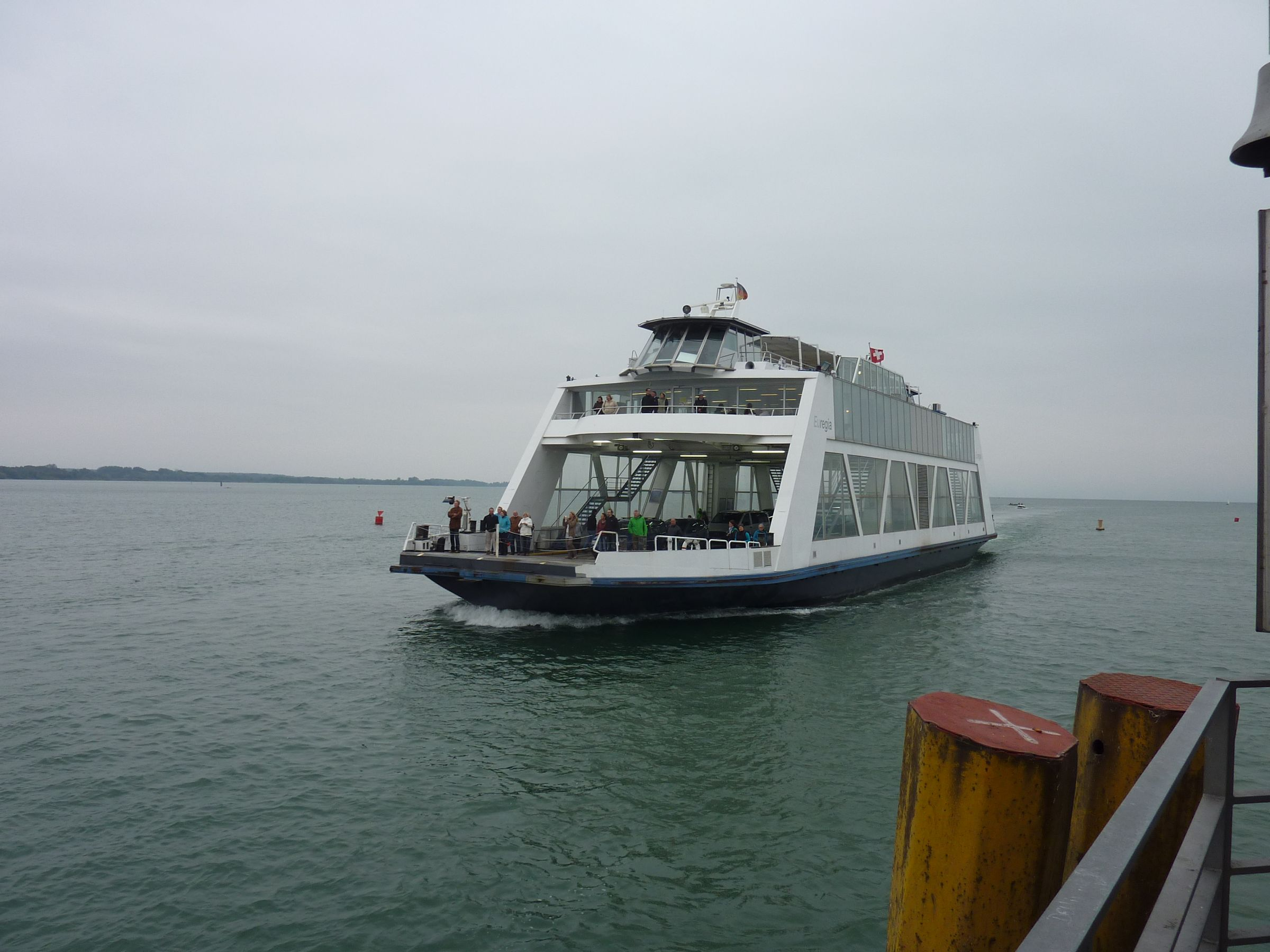 Euregia